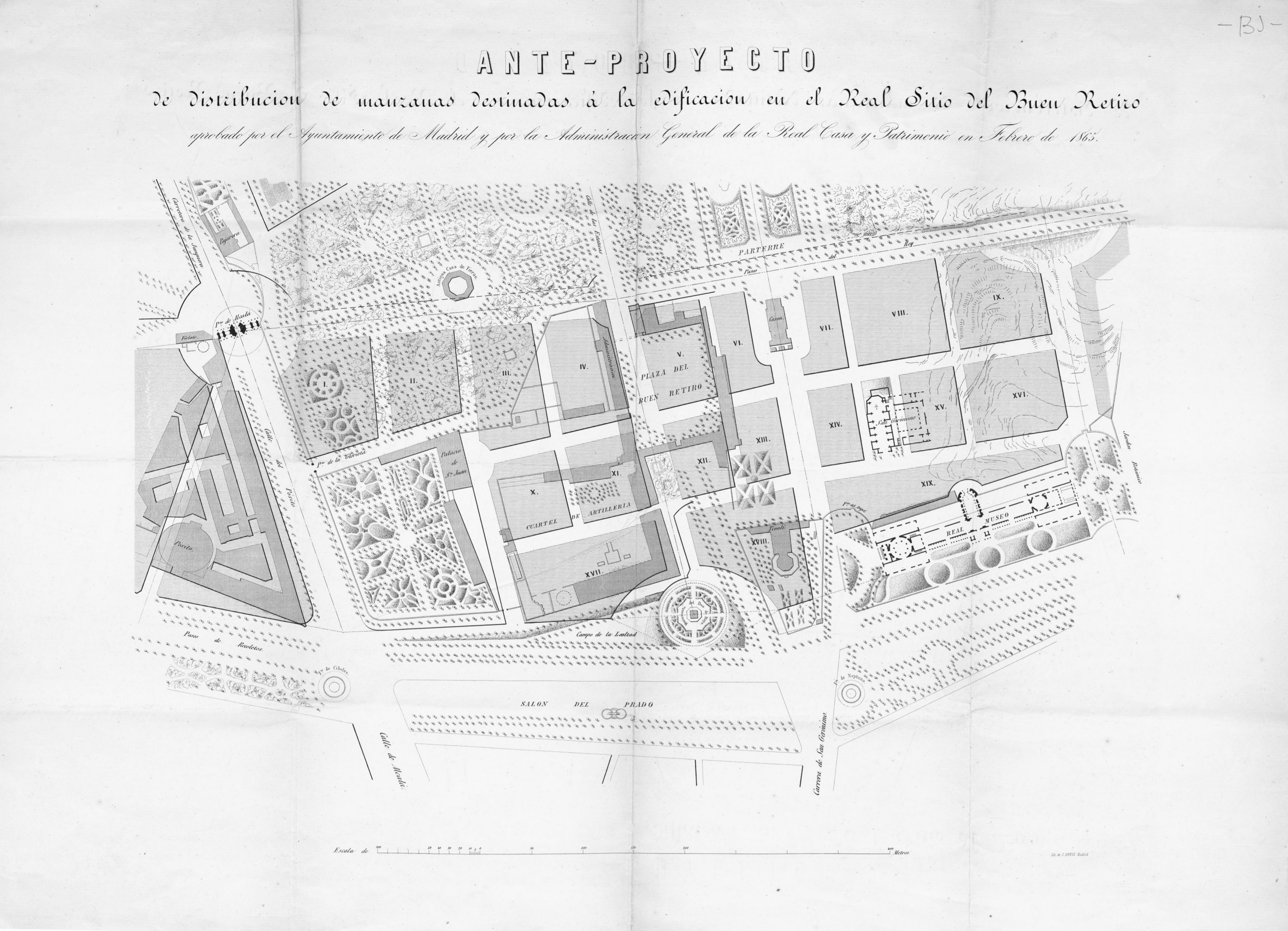 ANTE-PROYECTO / de distribucion de manzanas destinadas á la edificacion en el Real Sitio del Buen Retiro / aprobado por el Ayuntamiento de Madrid y por la Administracion General de la Real Casa y Patrimonio en Febrero de 1865 / Lit. de J. DONON Madrid